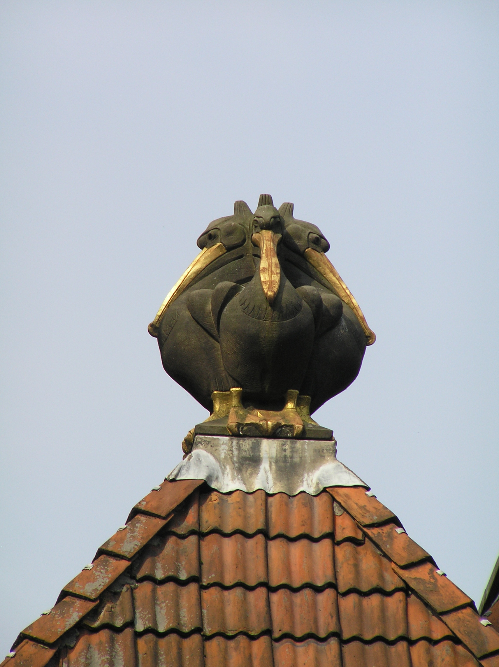 Vier pelikanen als ornament op het dak van het voormalig pand van levensverzekeringsmaatschappij Utrecht aan de Tweebaksmarkt te Leeuwarden. Door J. Mendes da Costa.